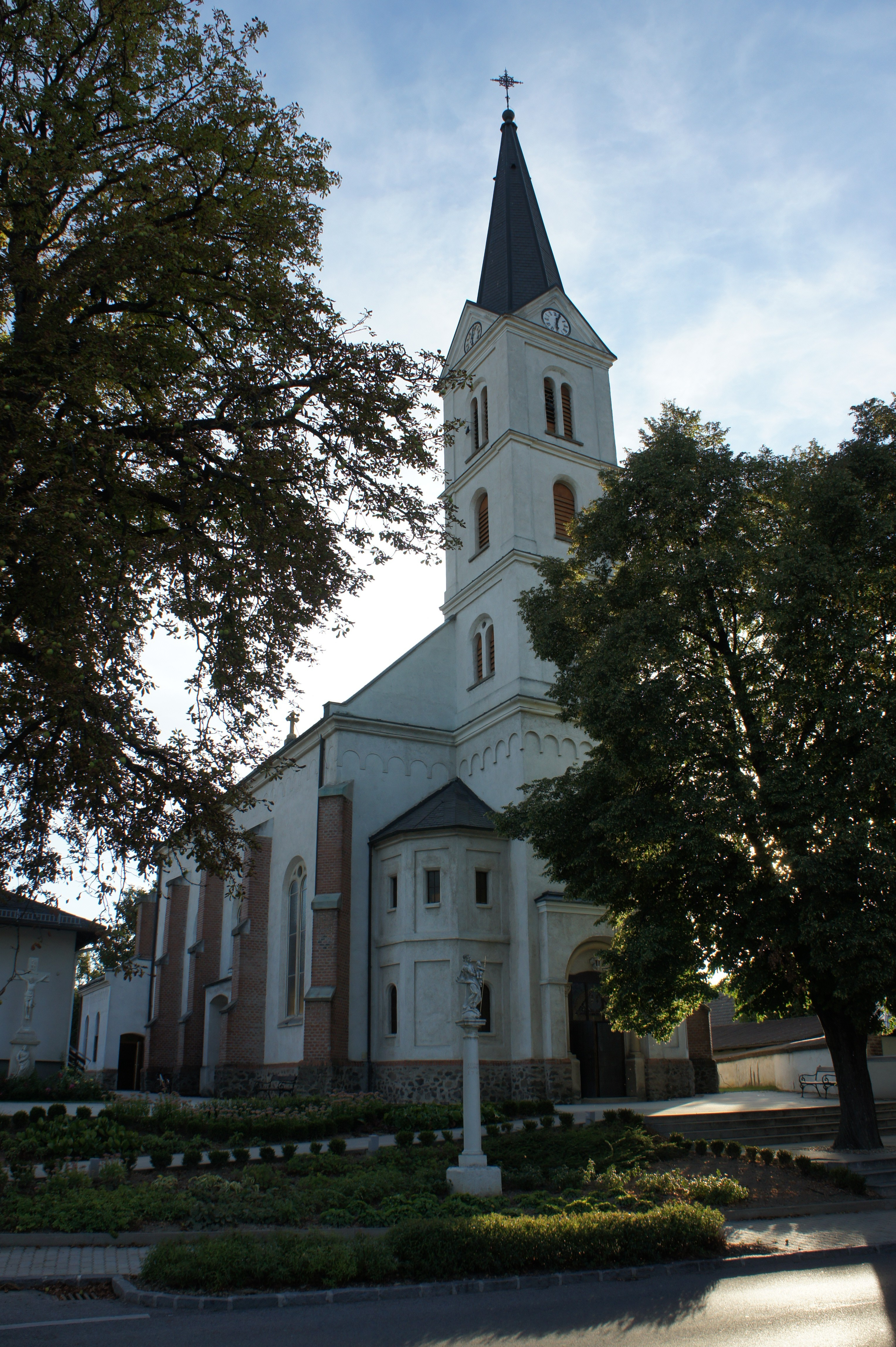 Kath. Pfarrkirche hl. Bartholomäus, Unterpullendorf, Österreich